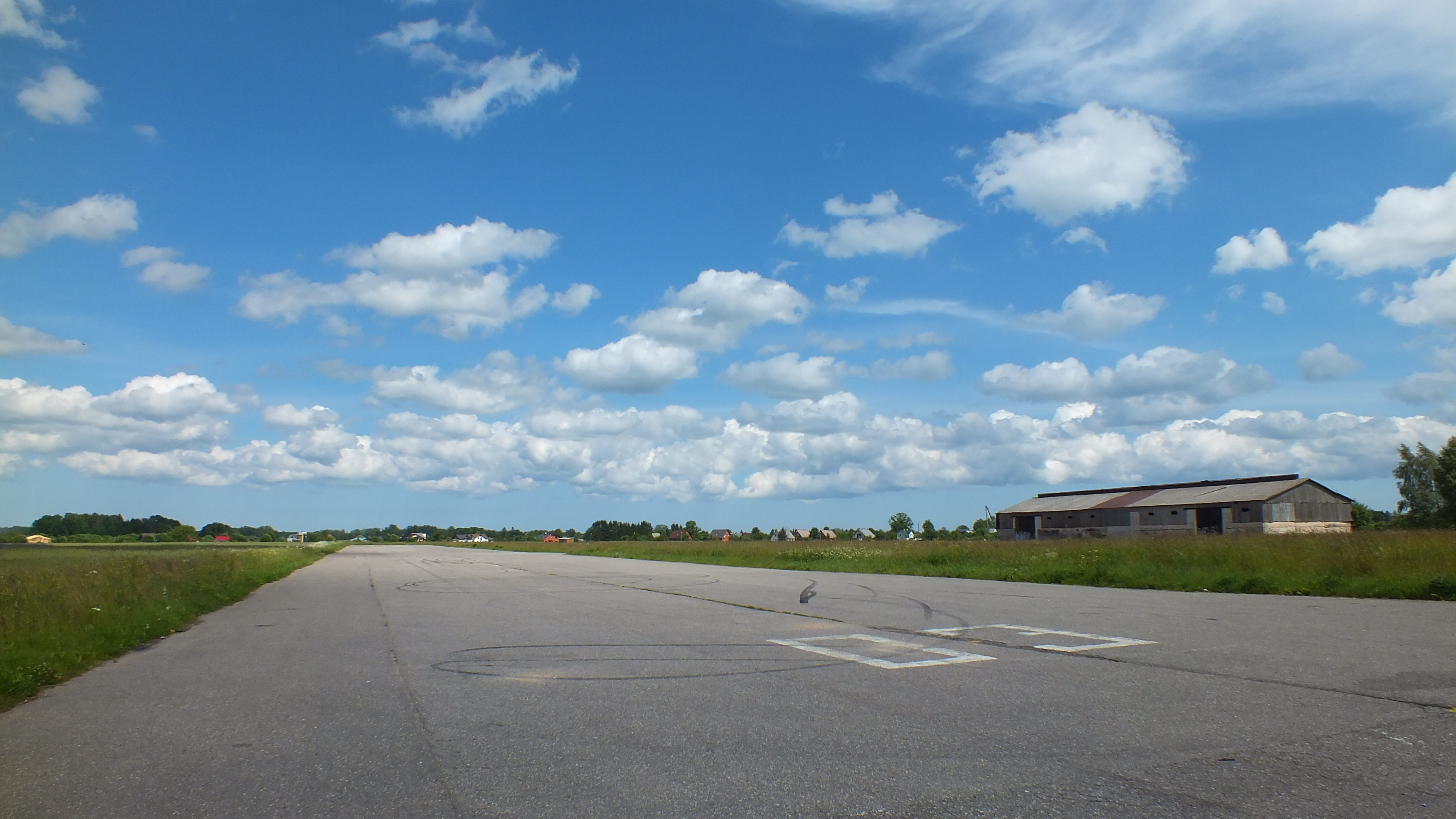 Talsu lidlauks